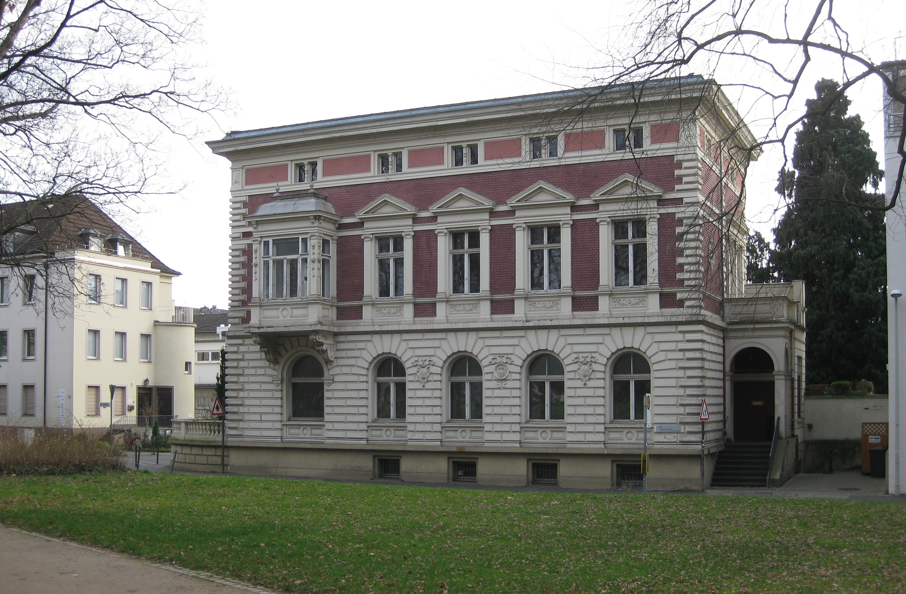 Villa, Am Hofgarten 15, Bonn-Südstadt This is a photograph of an architectural monument. 175